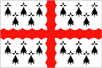 Drapeau du Vannetais